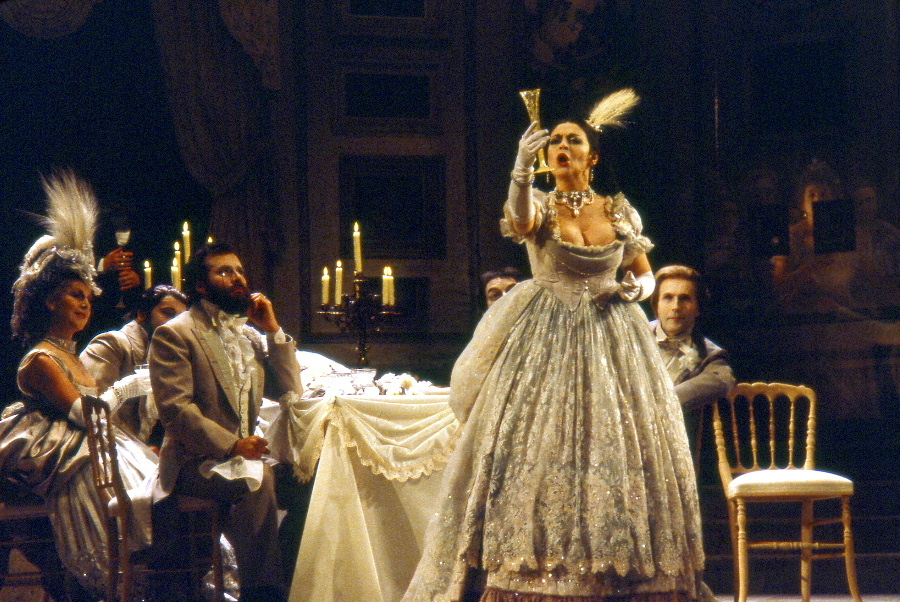 Strasbourg, Opéra National du Rhin, Catherine Malfitano dans le rôle de Violetta. Mise en scène Jean-Pierre Ponnelle, Mars 1980.